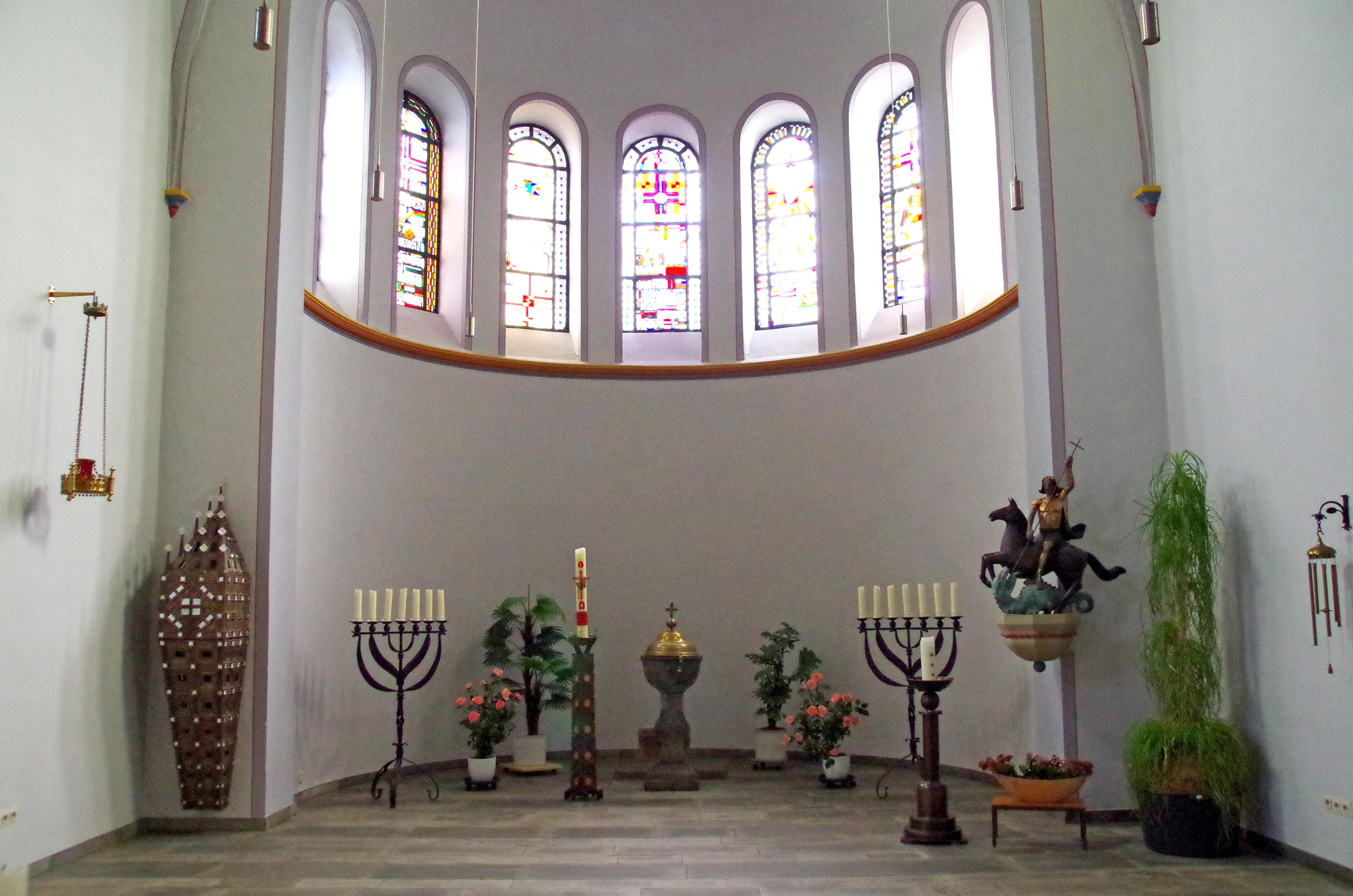 St. Georg (Dreiborn), Chorraum mit Sakramentshaus und Taufbecken